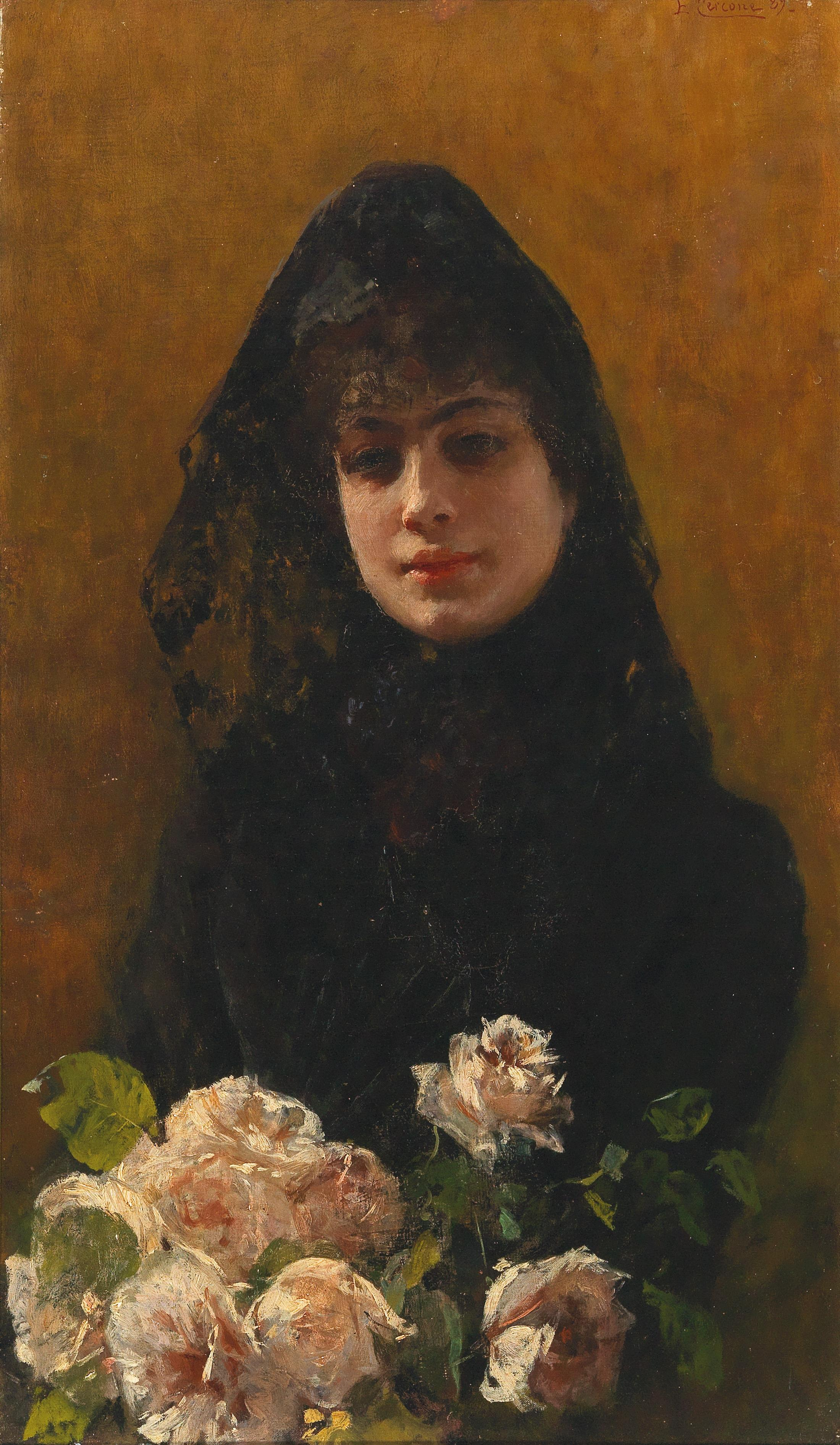 Ein Blumengruß, signiert, datiert E. Cercone (18)89, Öl auf Leinwand, 80 x 50 cm